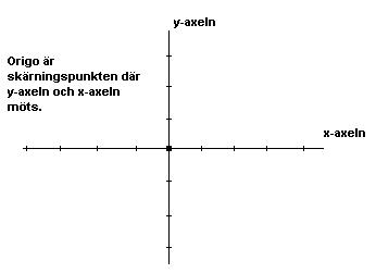 origo